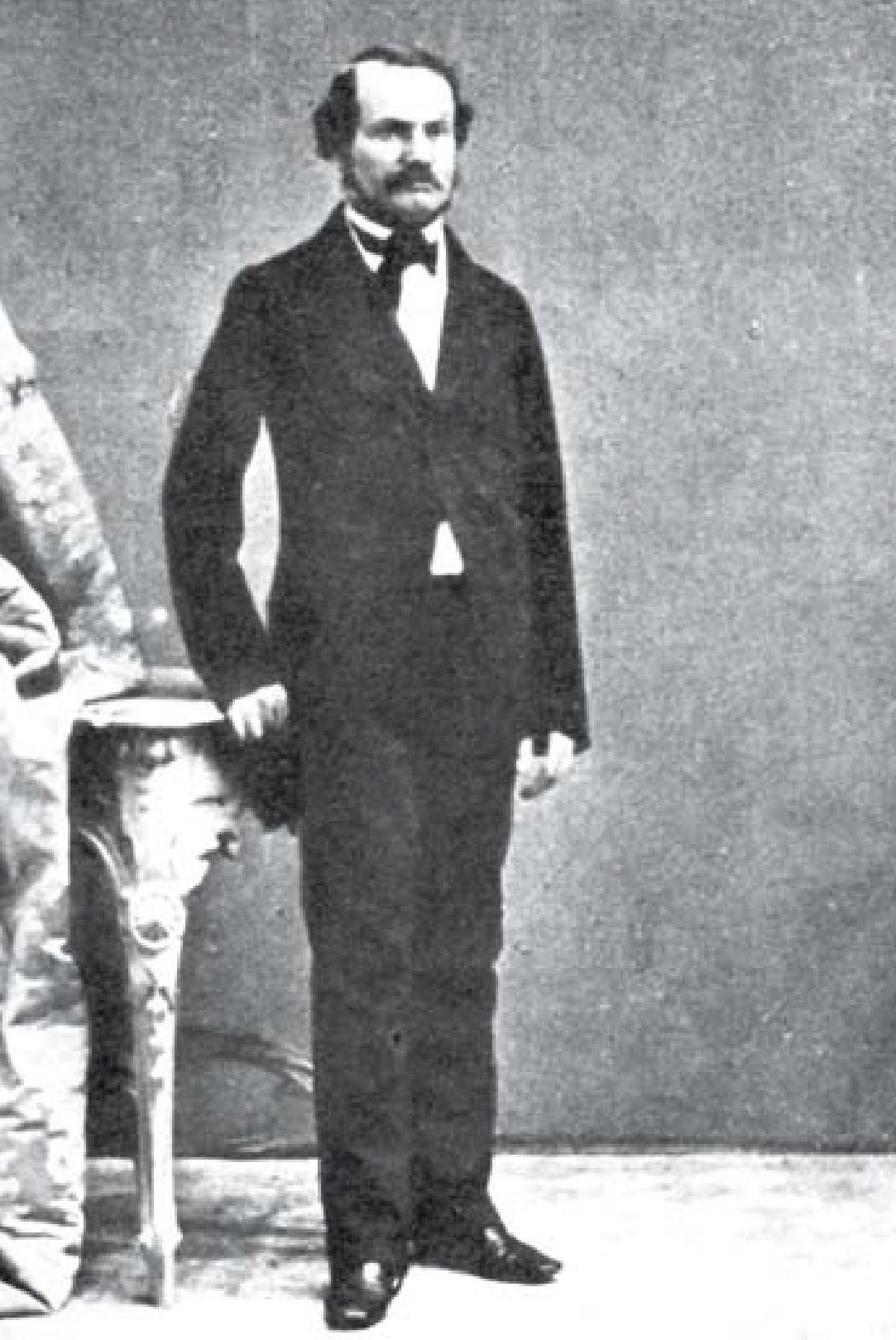 MUDr. Jacob Fischel (1813-1892)